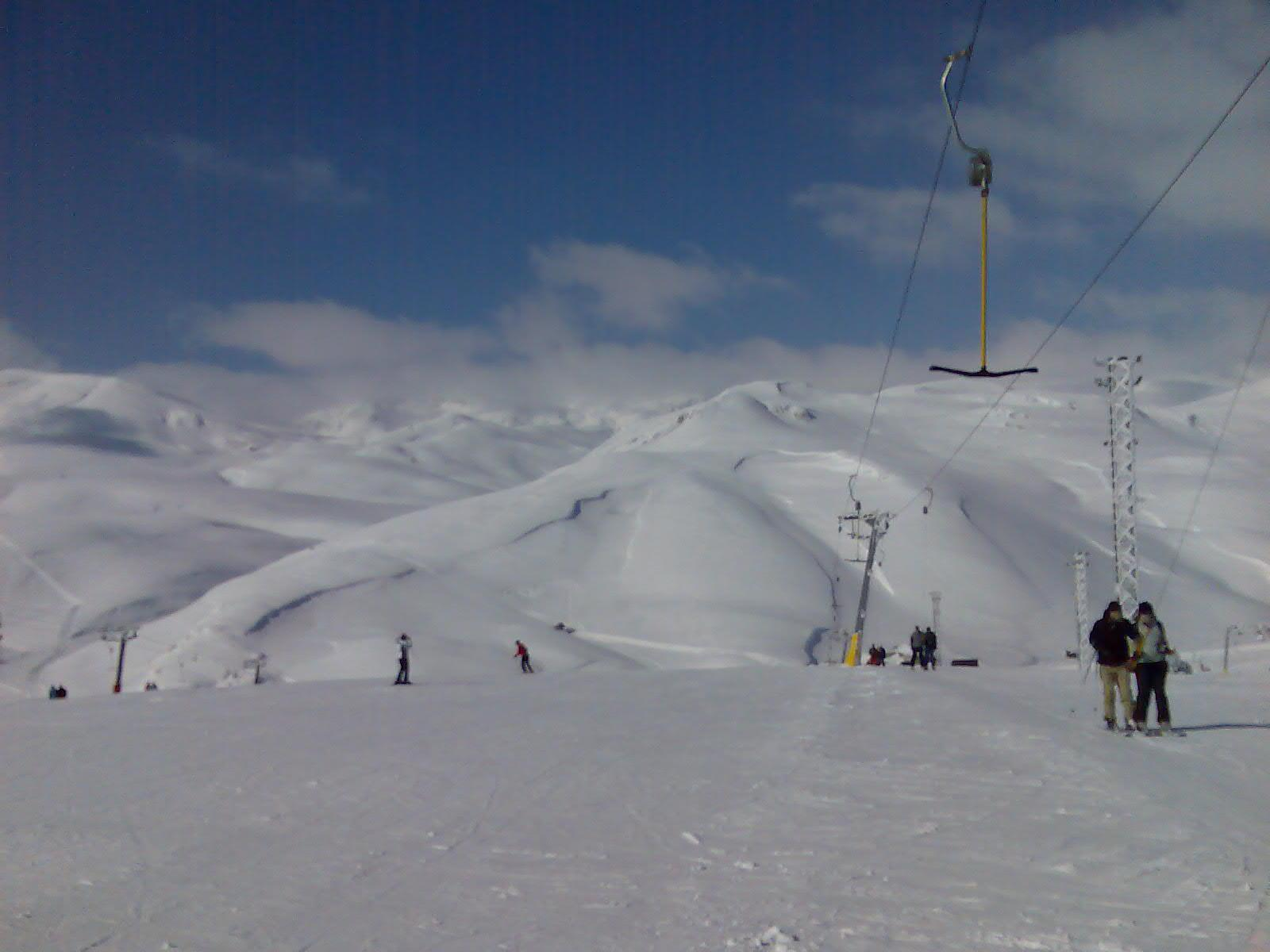 Mavrovo Ski Center